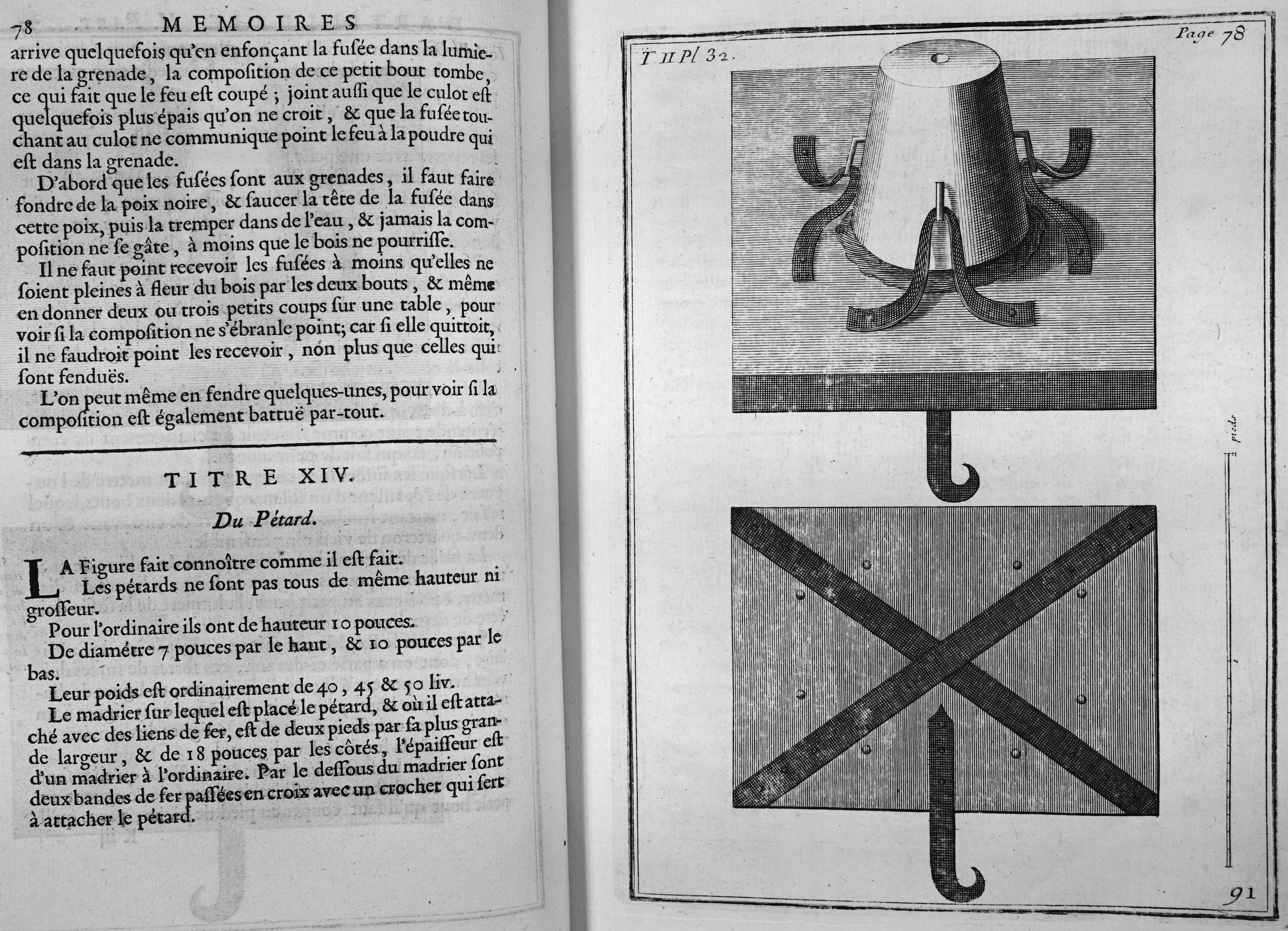 Mémoires d'artillerie, recueillis par M. Surirey de Saint Remy, exemplaire de la B.M. de Reims, troisième édition.